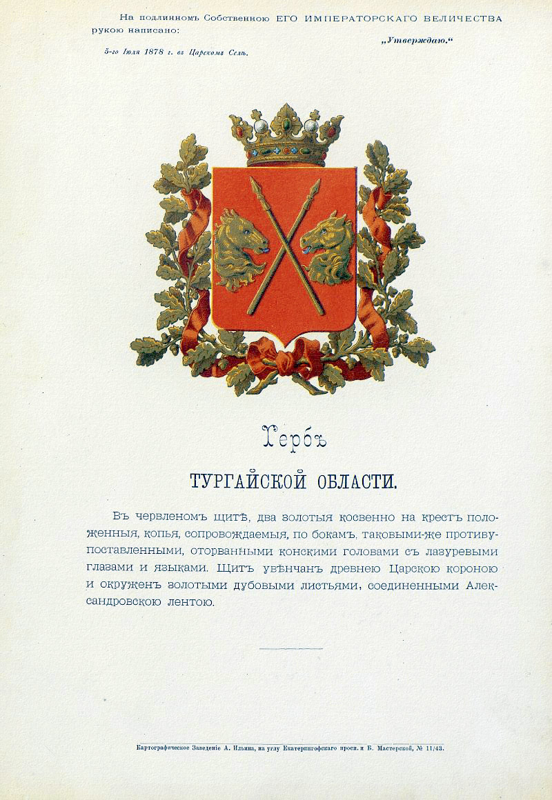 Official Russian Empire coat of arms Turgai Oblast. Герб Российской Империи Тургайской области с официальным описанием в Гербовнике Бенке. Утверждён Императором Всероссийским Александром Вторым в 1878 году.